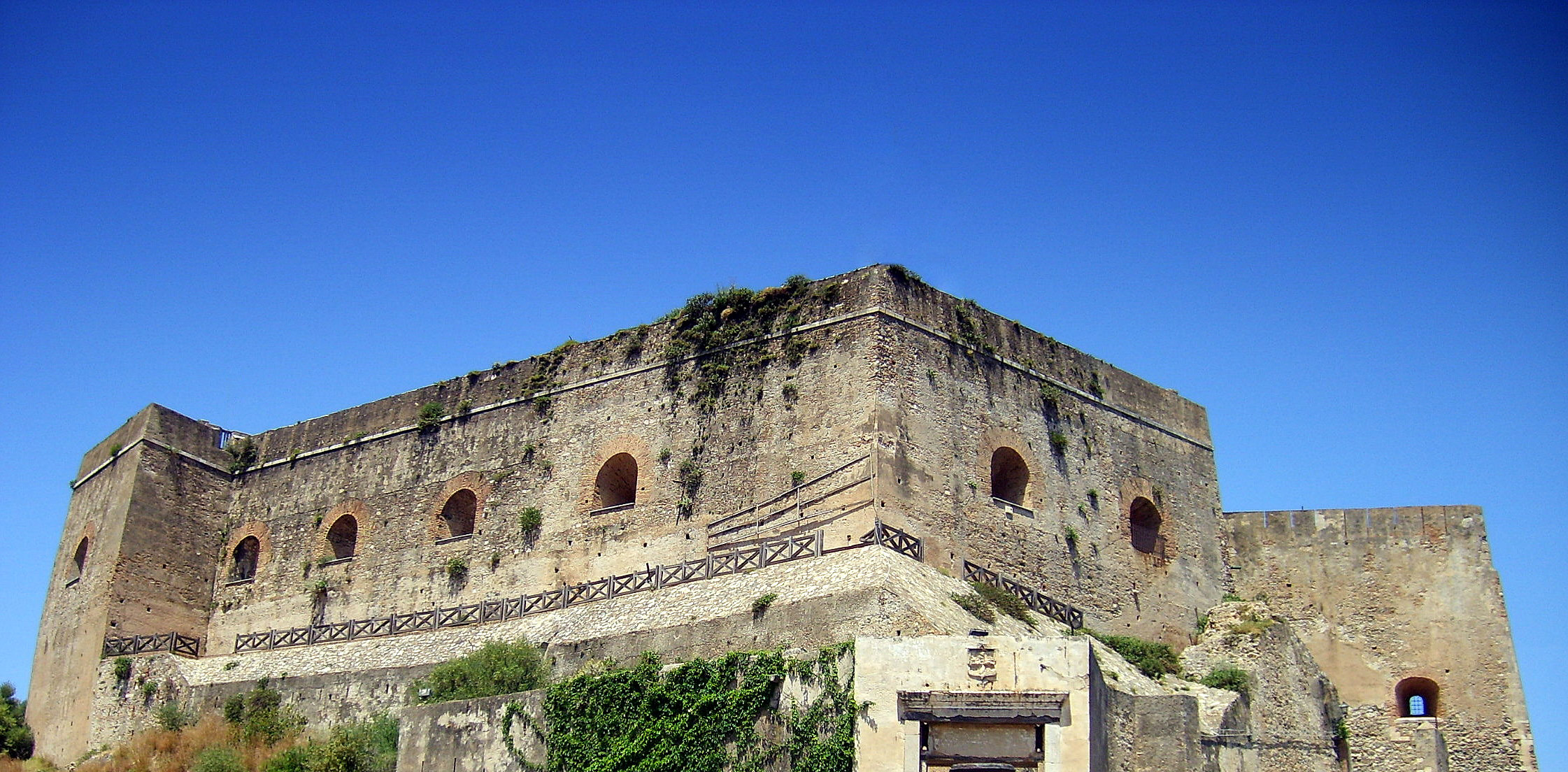 Castello Ruffo di Scilla, 20 km da Reggio Calabria